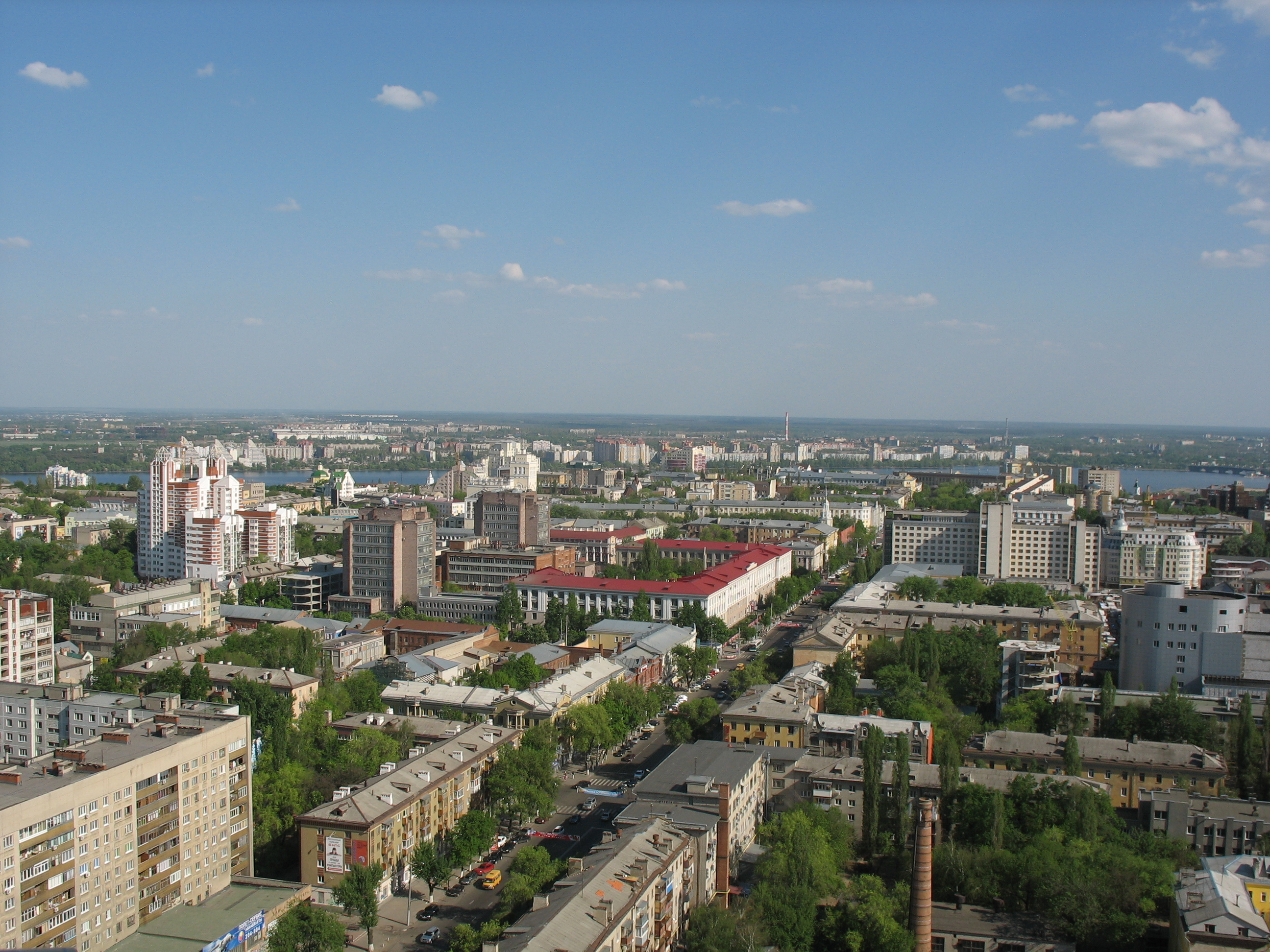 Вид на центр города с Галереи Чижова